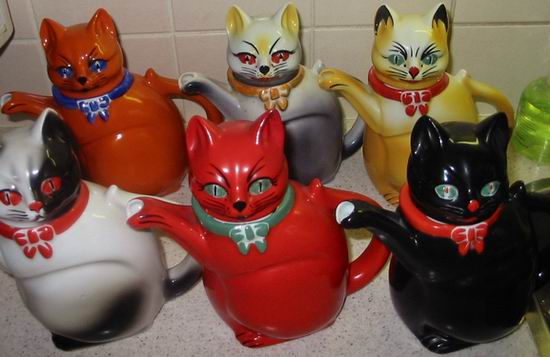 zelfgemaakte foto van eigen verzameling